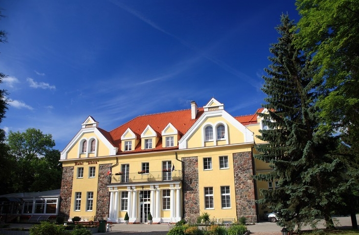 Ublik, województwo warmińsko-mazurskie, powiat piski, gmina Orzysz